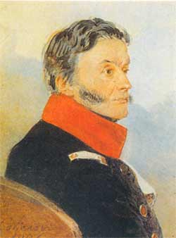 Николай Николаевич Раевский (1771-1829)